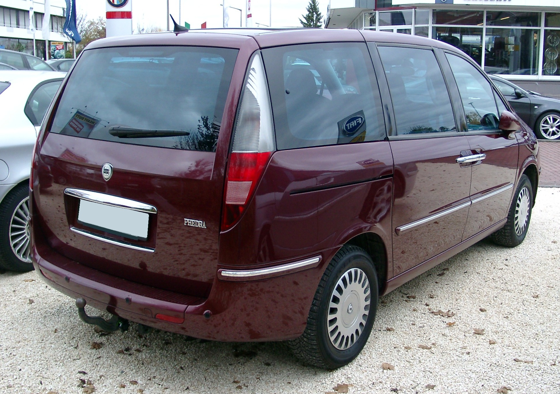 Lancia Phedra 2.2 16v JTD Executive, Baujahr 2003